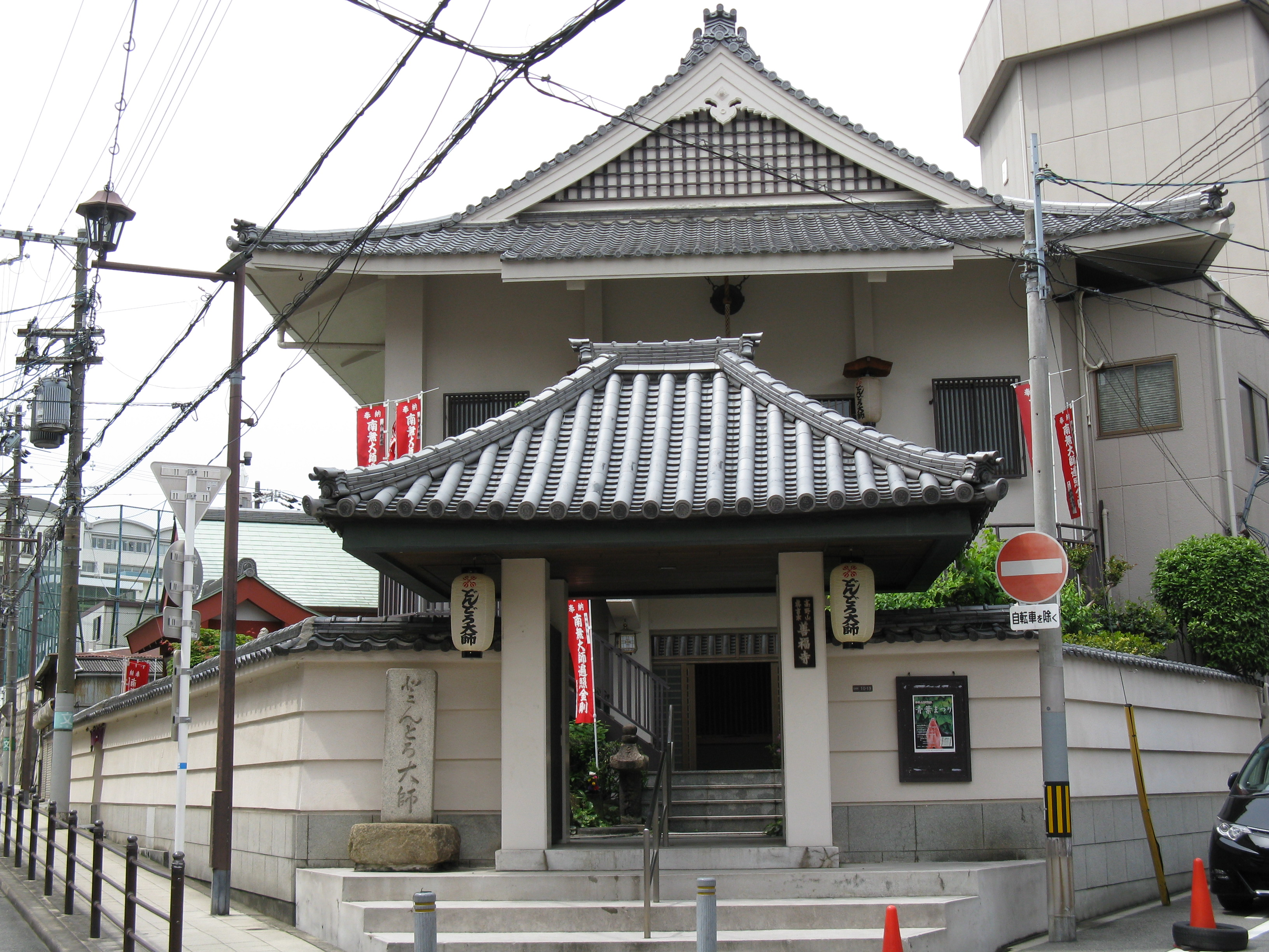 善福寺